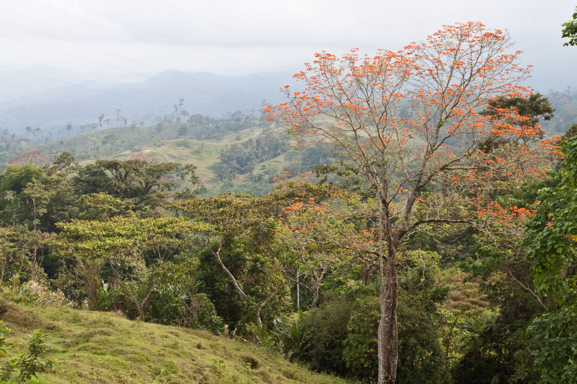 Turrialba-1